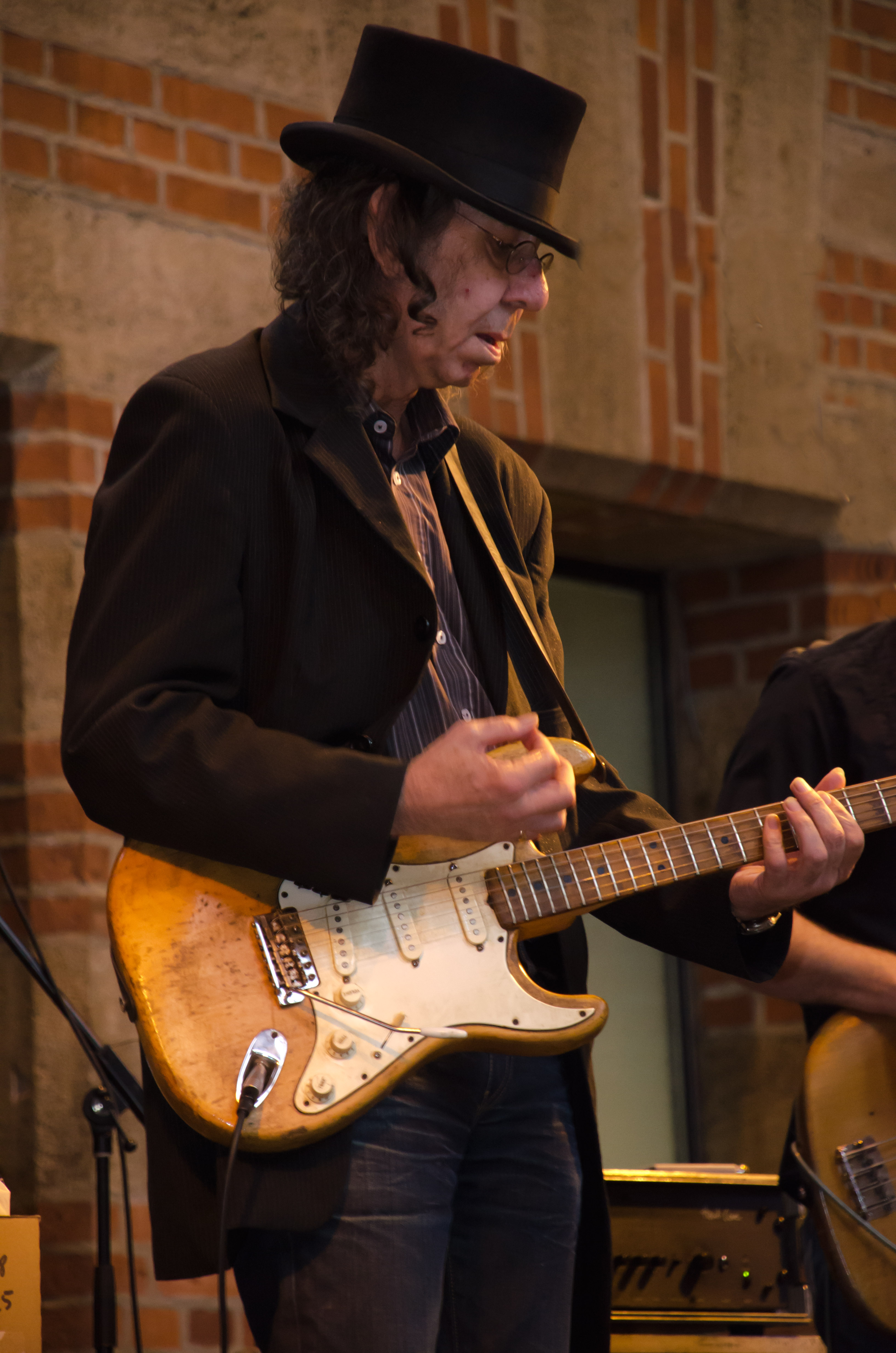 Gitarrist Nick Woodland. Stuttgart, 20.7.2012